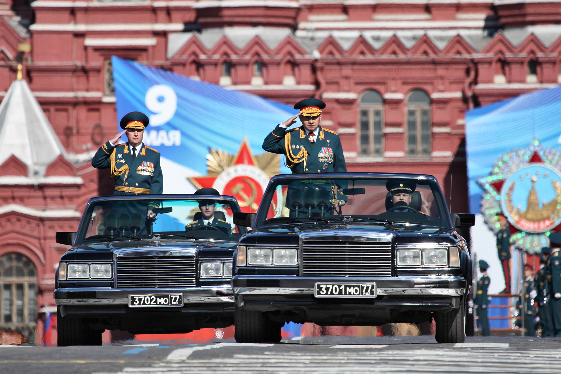 Сергей Шойгу и главнокомандующий СВ Владимир Чиркин (Minister of Defence and Land Forces Commander-in-Chief)